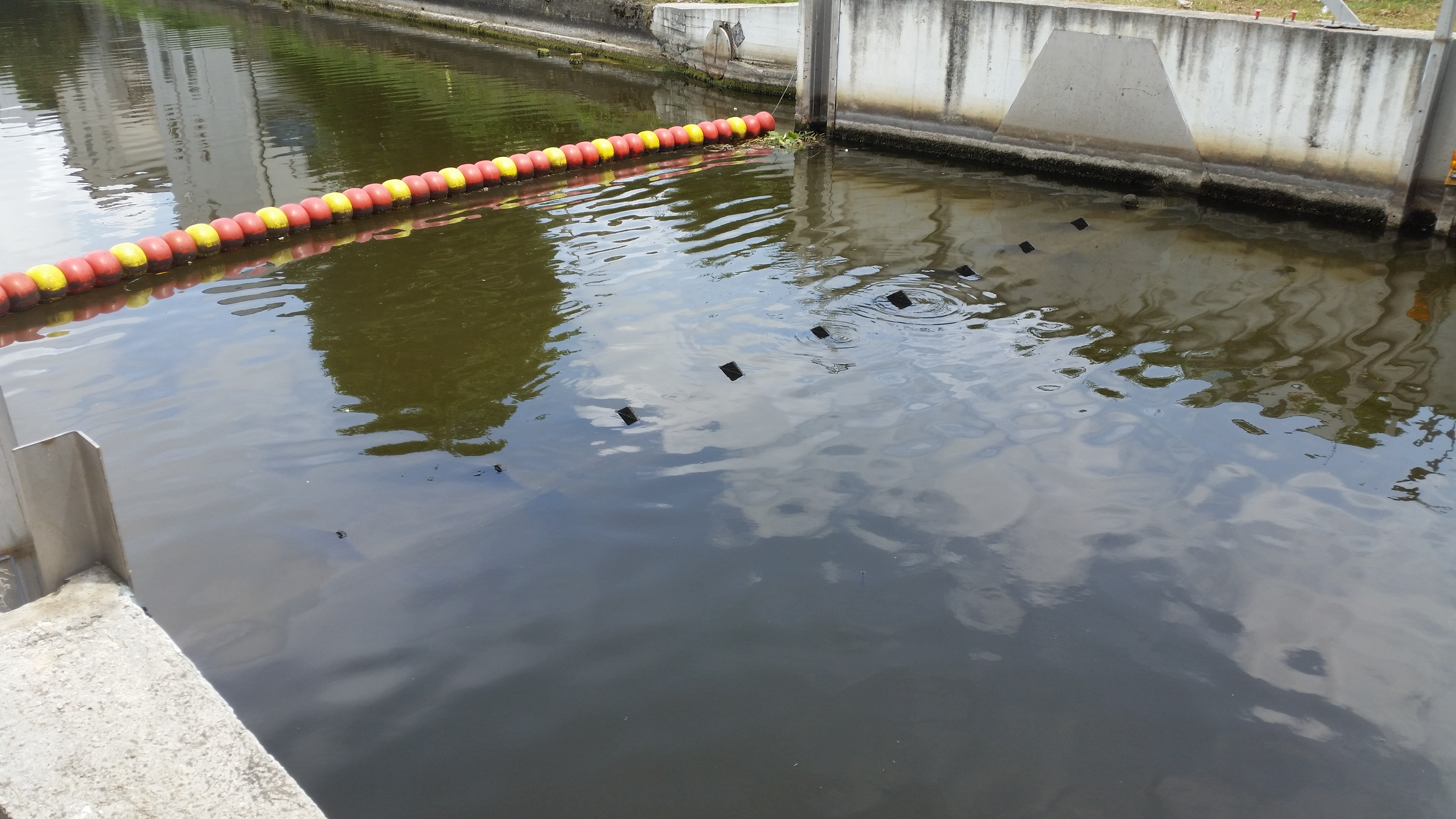 In funzione dei livelli di salinità nel canale Burlamacca, lo sbarramento automaticamente definisce quale è la quota di intervento per sbarrare il cuneo salino e consentire la navigazione